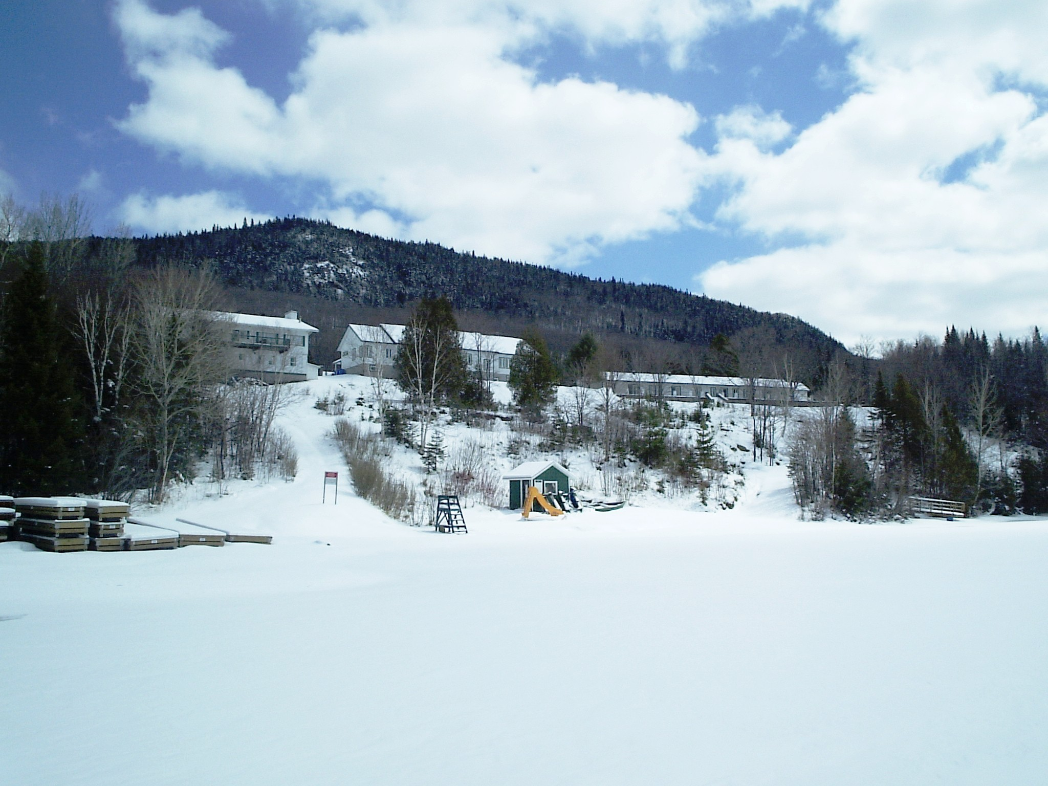 Campus des Quatre-Vents de Saint-Donat (Québec) en hiver